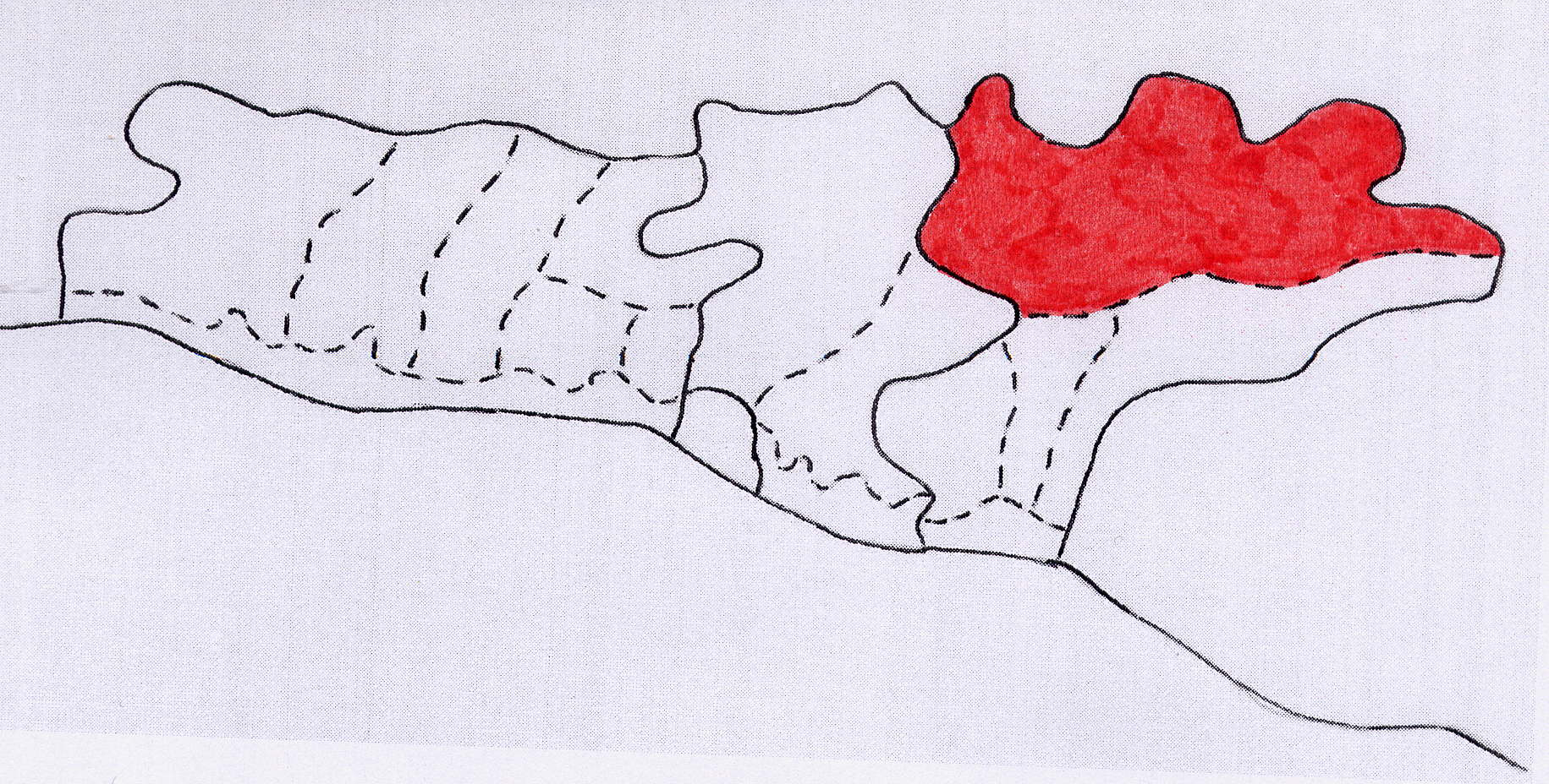 Краснополянский поселковый округ (Сочи)